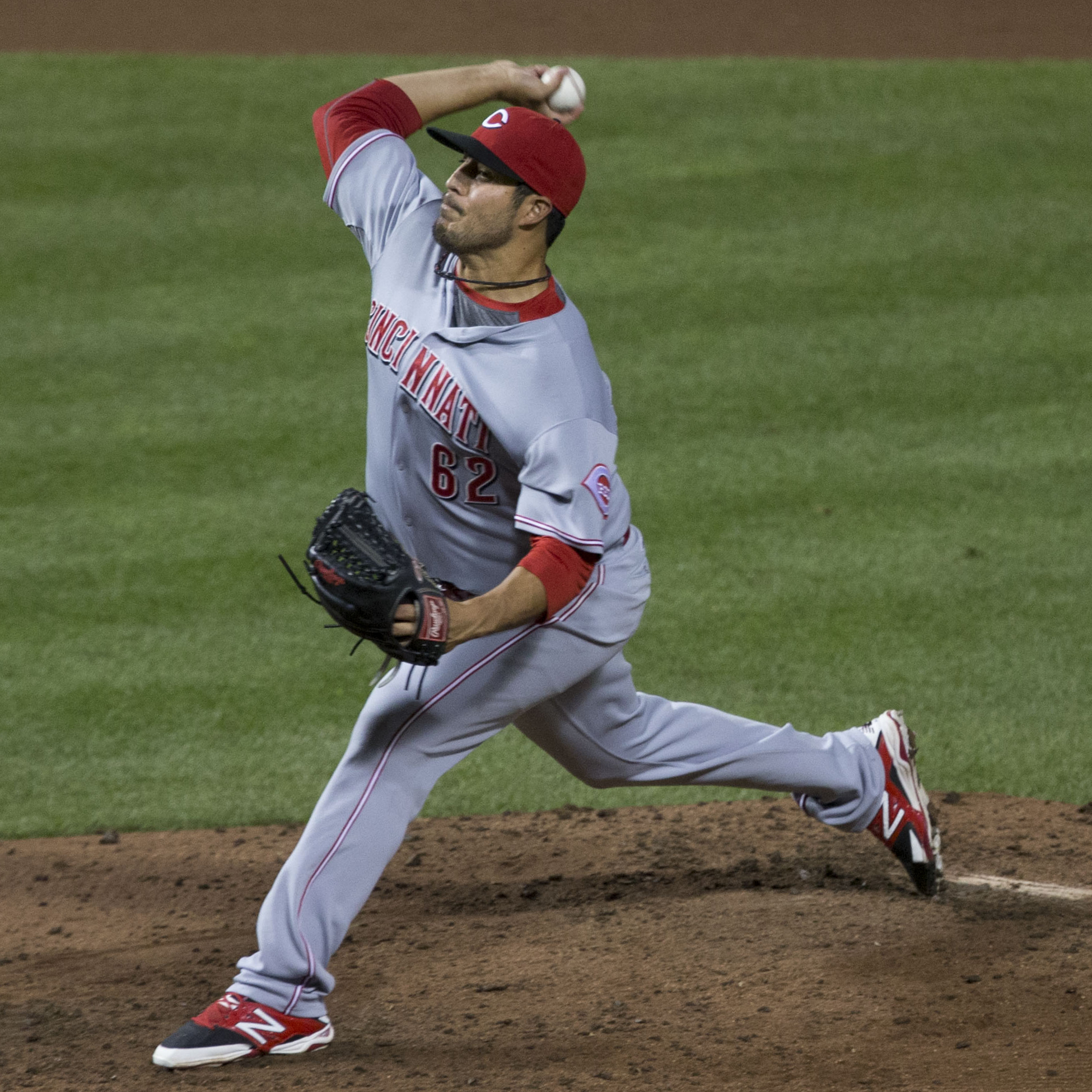 Pedro Villarreal